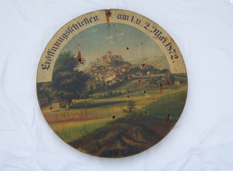 Schützenscheibe Zimmerbüchsen-Schützengesellschaft von 1864 Wörth an der Donau Eröffnungsschießen 1872